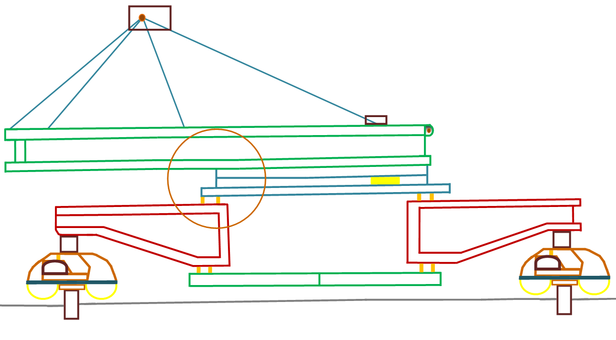 Монтаж поворотной платформы КБМ-401